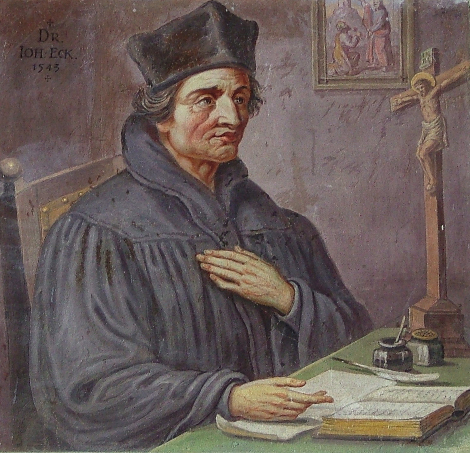 Johannes von Eck